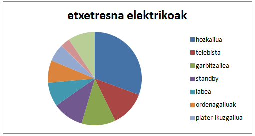 etxe tresna elektrikoaren grafikoa